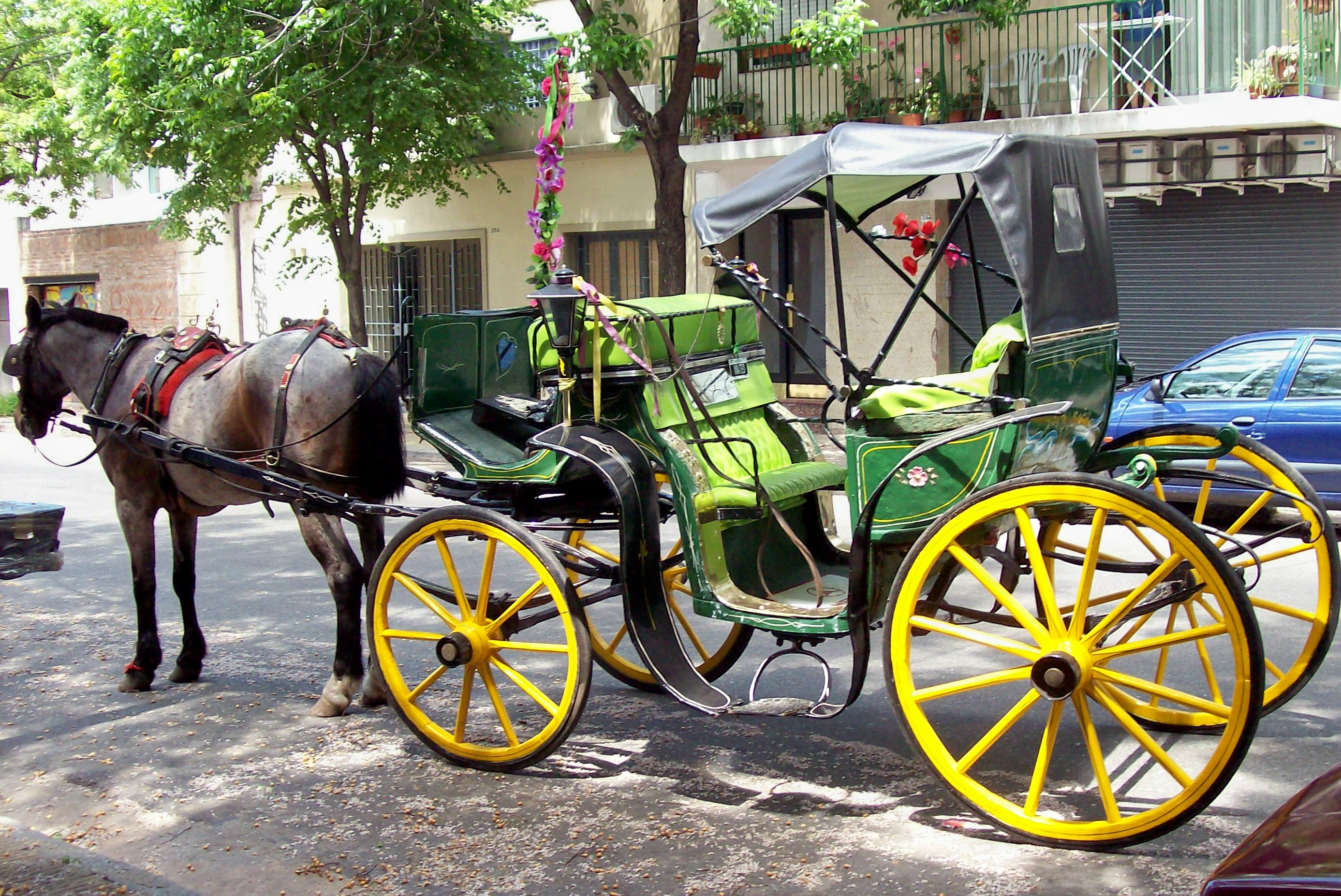 "Mateo" con Fileteado porteño, en el barrio de Colegiales, ciudad de Buenos Aires.